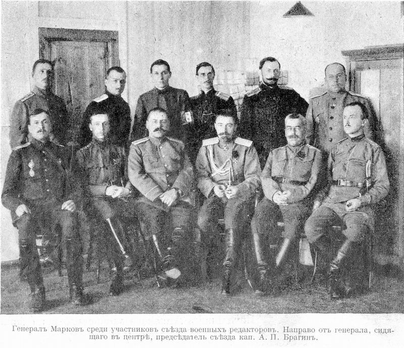 Съезд военных редакторов, 1917 год. В центре сидит третий справа - председатель съезда капитан А. П. Багин, третий слева - генерал С. Л. Марков